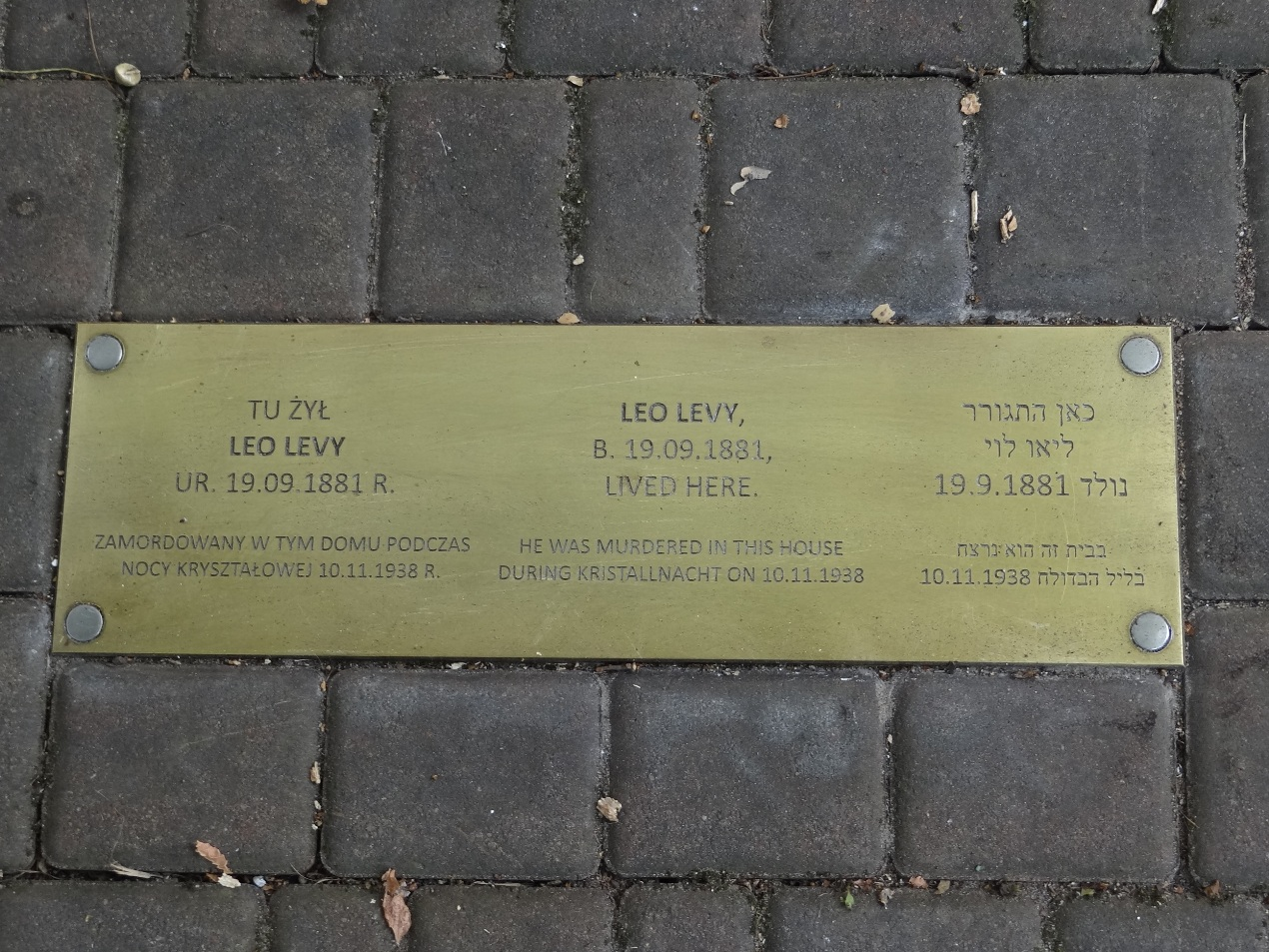 Połczyn-Zdrój, ul. Zdrojowa 2 - Tabliczka upamiętniająca Leo Levego